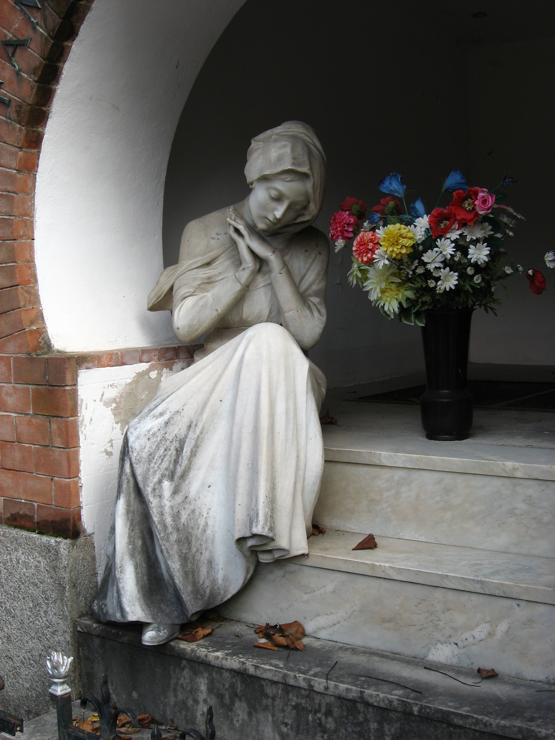 Scultura di Giuseppe Vittorio Cerini (1862-1935), situata nella cappella di famiglia, nel cimitero di Arcumeggia.